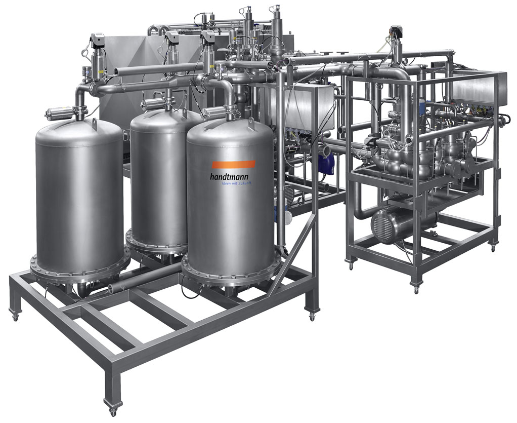 CSS (Combined Stabilization System) Stabilisierungssystem